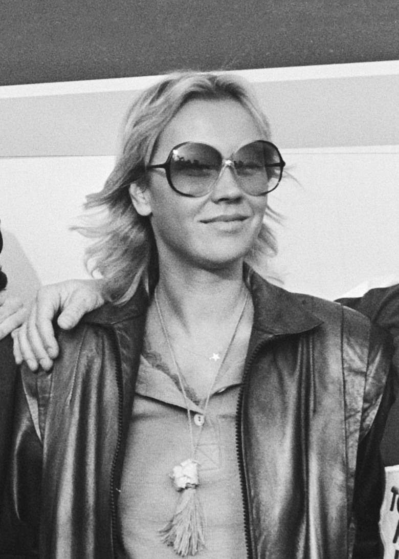 Popgroep ABBA aangekomen op vliegveld Zestienhoven Rotterdam: Agnetha Fältskog